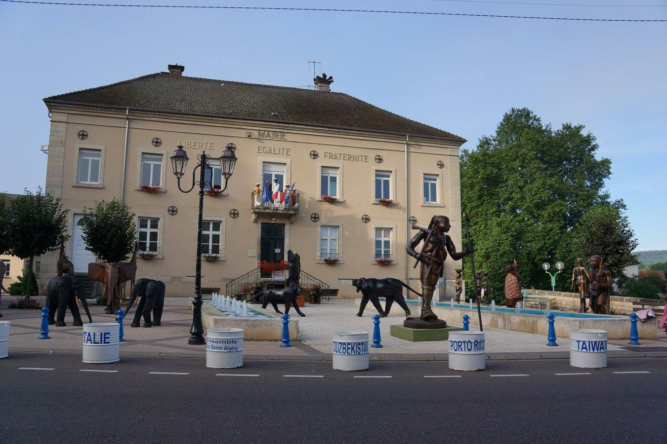 la mairie de Port-sur-Saône